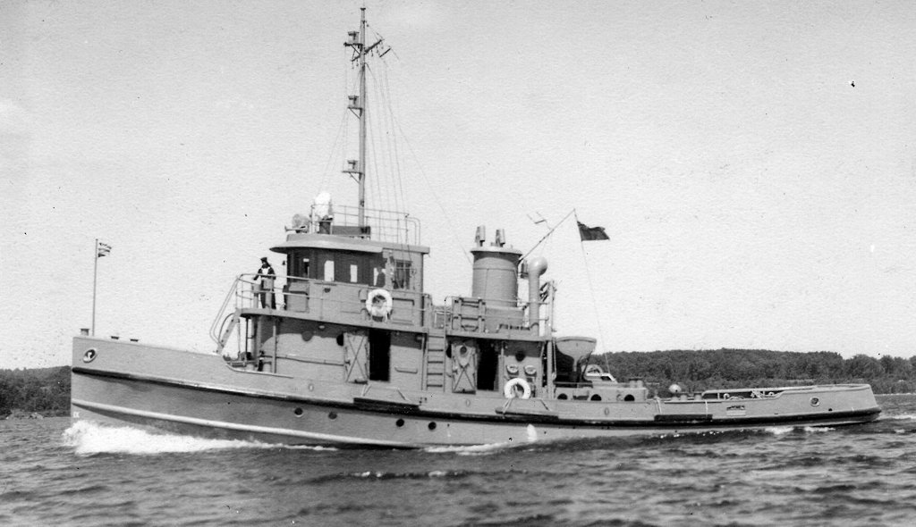 WW2 tugboat HMCS Glenside.